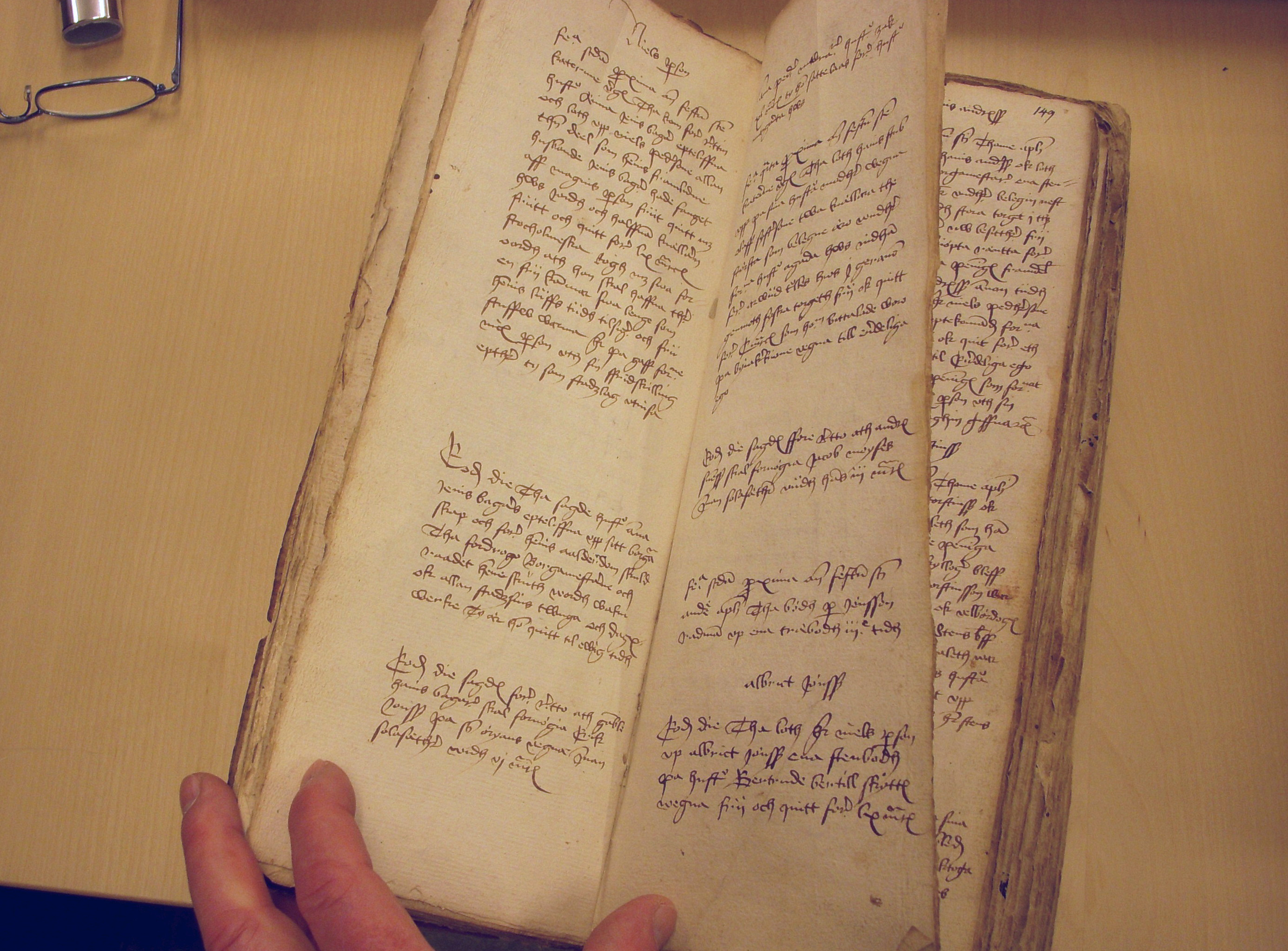 Stockholms stadsarkiv Kungsklippan, Kungsholmen i Stockholm, tänkebok från 1479-1483.